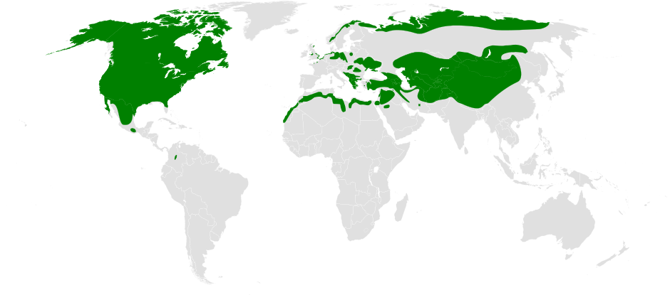 Eremophila distribution map